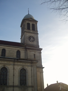 Clocher de l'église de Dampierre sur Linotte